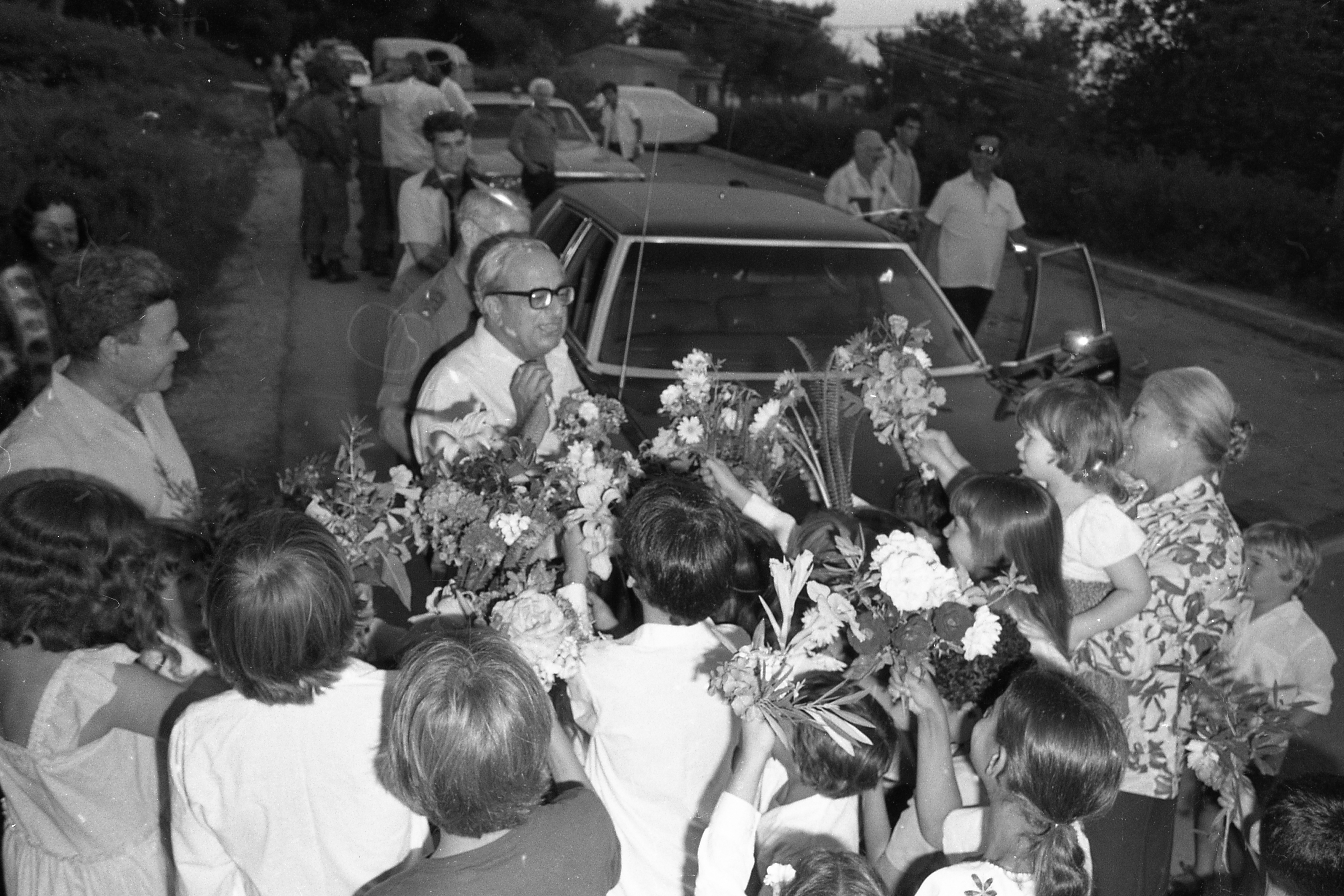 לאחר הפגזת קטיושות על קיבוץ סער, במהלך מלחמת לבנון הראשונה, ב-4.6.1982, הגיע נשיא המדינה המנוח יצחק נבון לביקור עידוד בקיבוץ. חברי הקיבוץ קיבלו אותו בכבוד רב והתרגשות גדולה והתאספו בחדר האוכל לארוחה חגיגית בה נשא הנשיא נבון נאום מול החברים וקיבל שי צנוע, אלבום תמונות של הקיבוץ. באדיבות ארכיון קיבוץ סער.